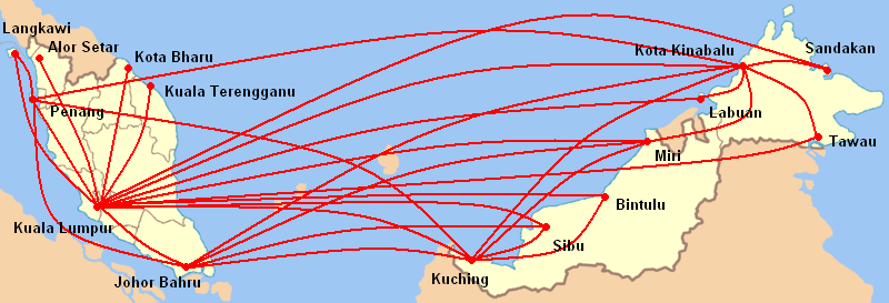 AirAsia domestic route map